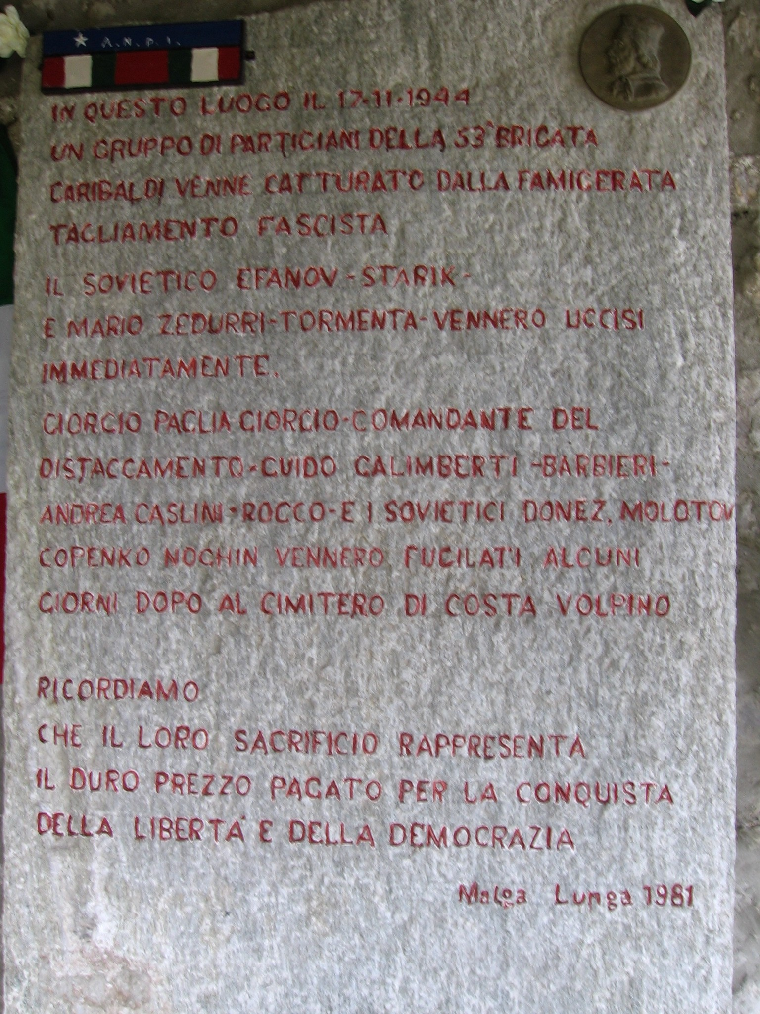 Malga lunga, Bergamo, Italia